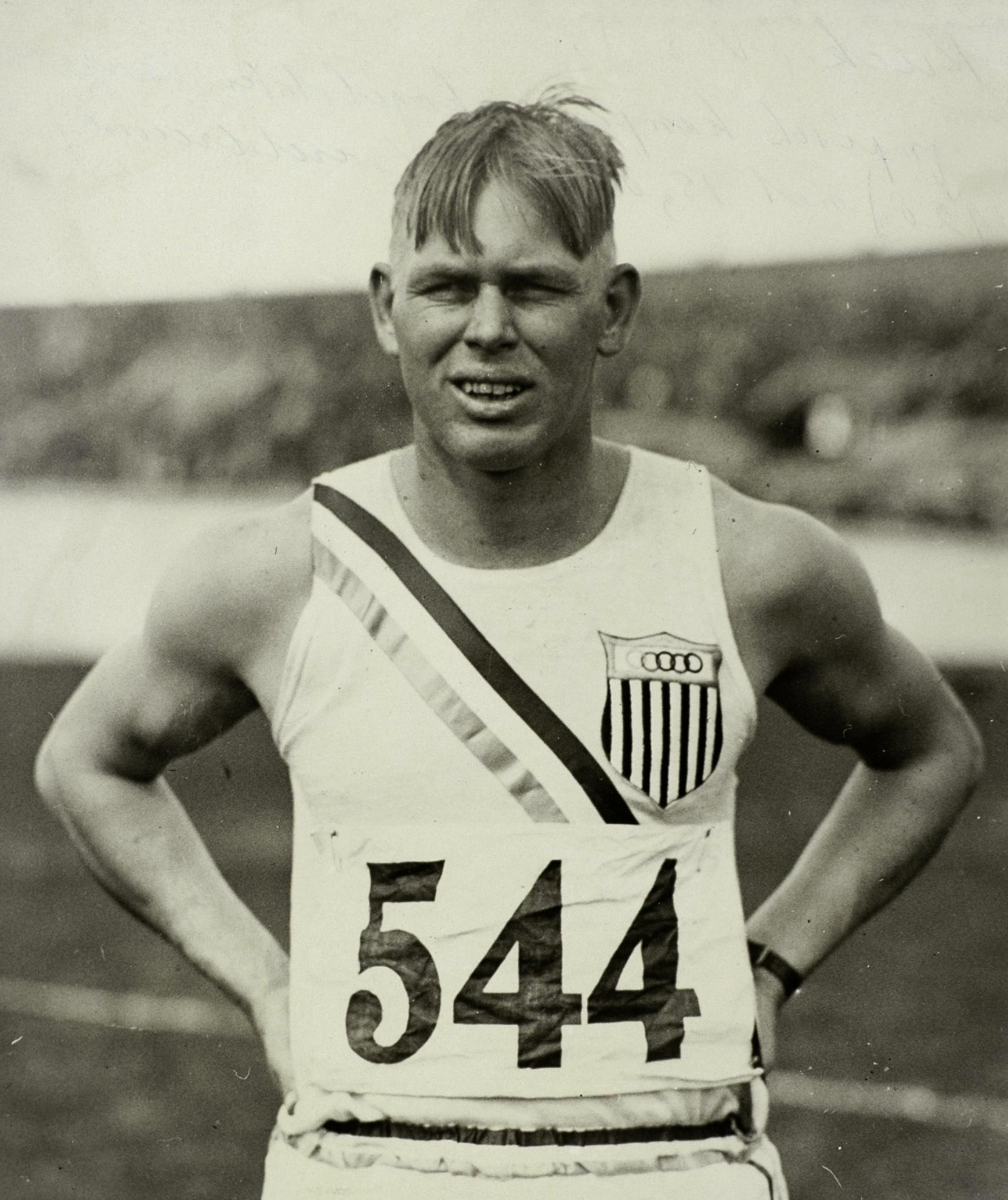 Sport. Sport, Olympische Spelen Amsterdam, 1928 : De Amerikaan J. Kuck, olympisch kampioen kogelstoten met 15.87 m, een wereldrecord.